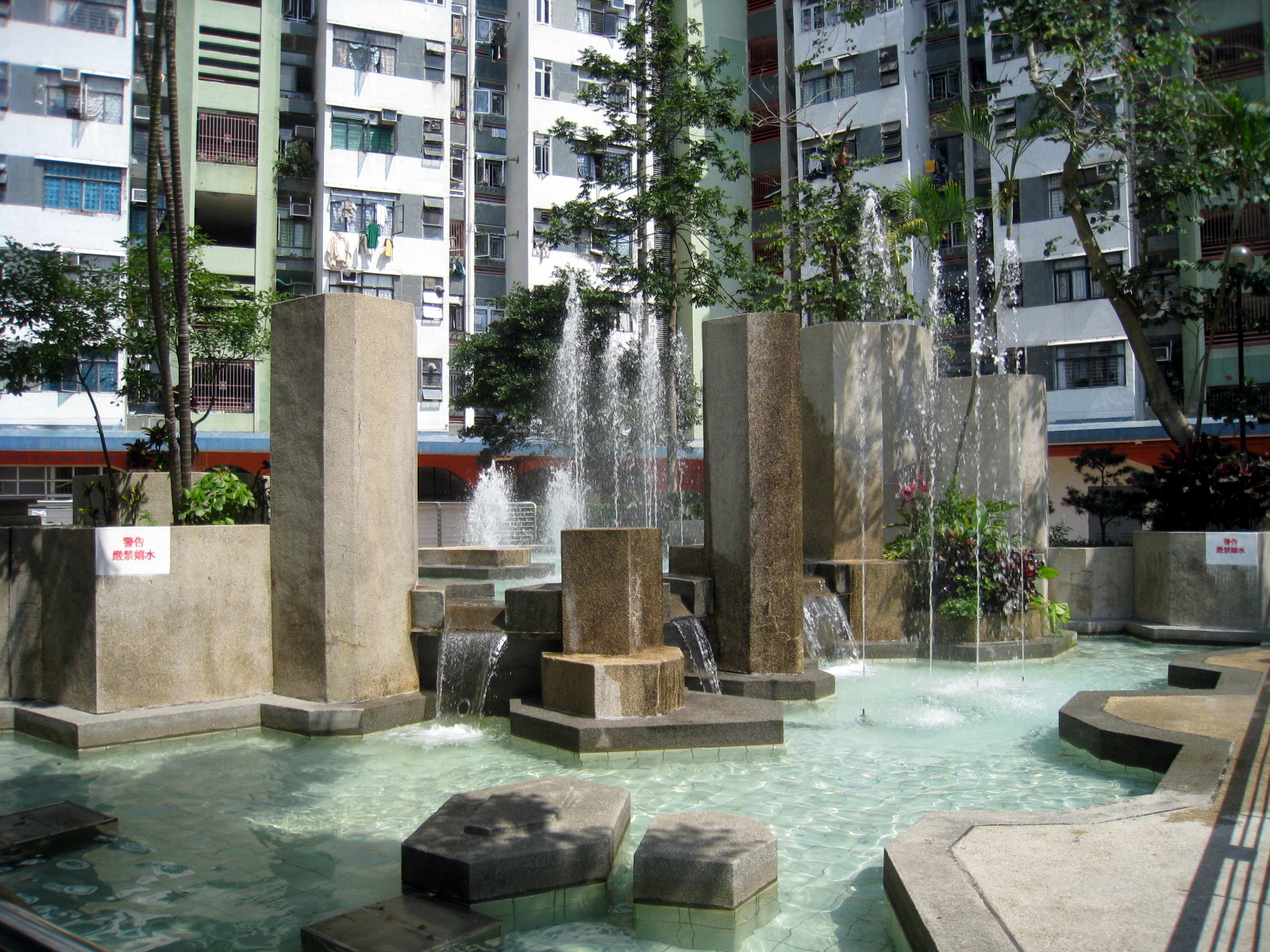 Fu Shin Estate 富善邨